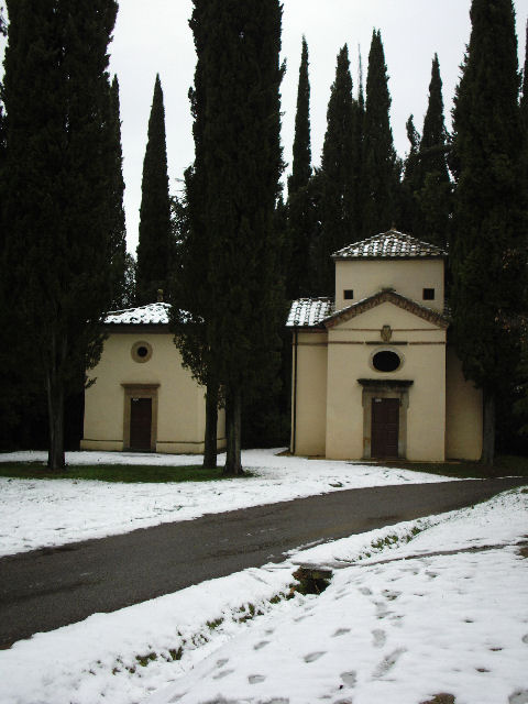 San Vivaldo, cappelle con la neve